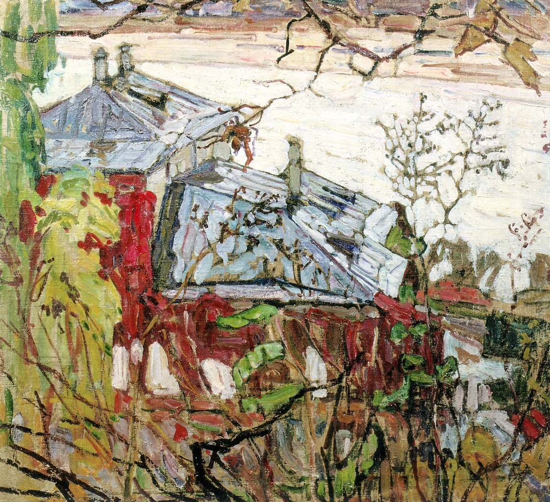 Dnieper by Kievlabel QS:Len,"Dnieper by Kiev" label QS:Luk,"Дніпро біля Києва"